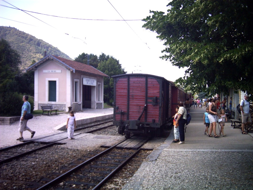 En gare de la Mure, voyageurs autour d'un train en partance pour Saint-Georges-de-Commiers.